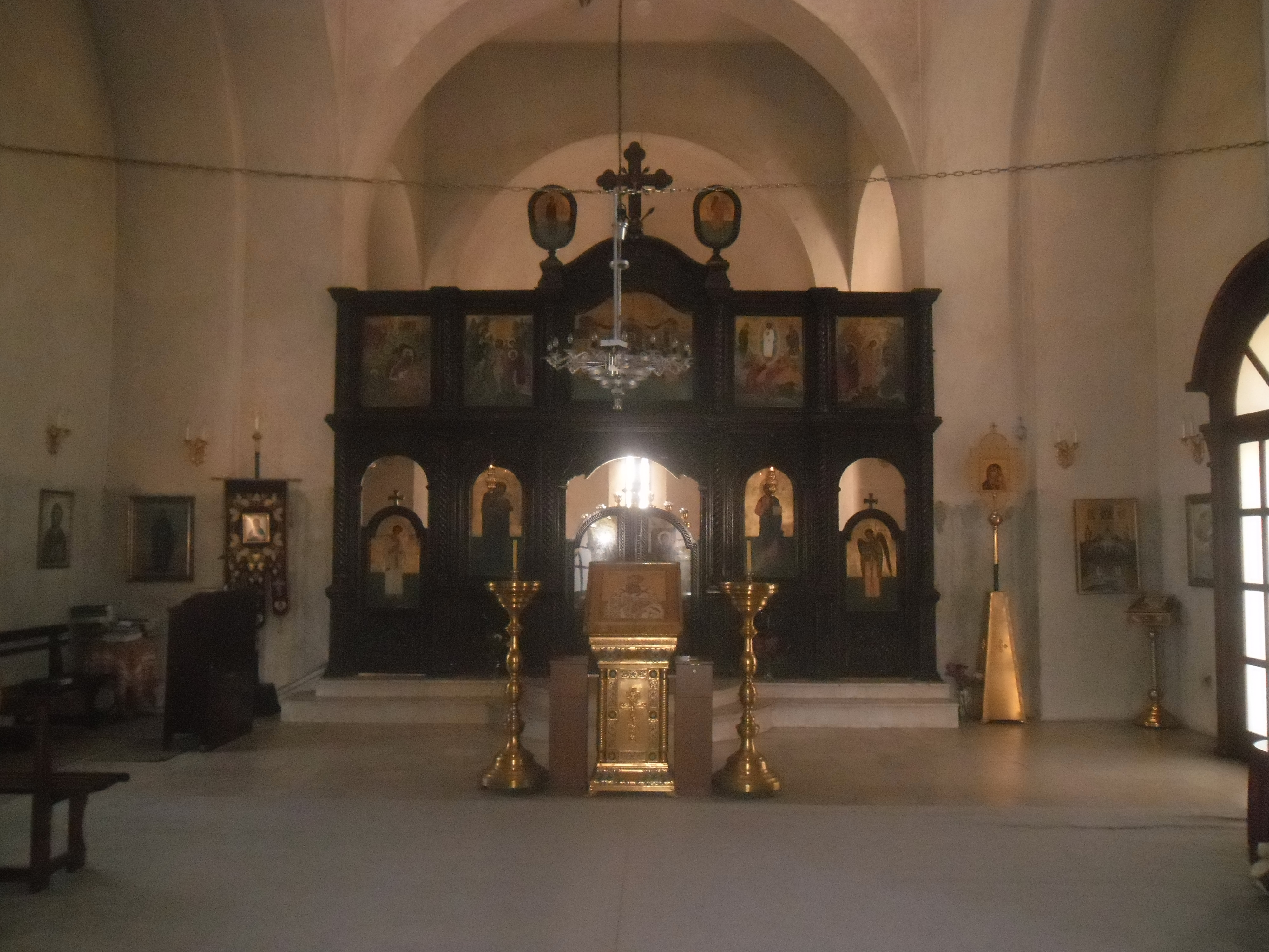 Tivat